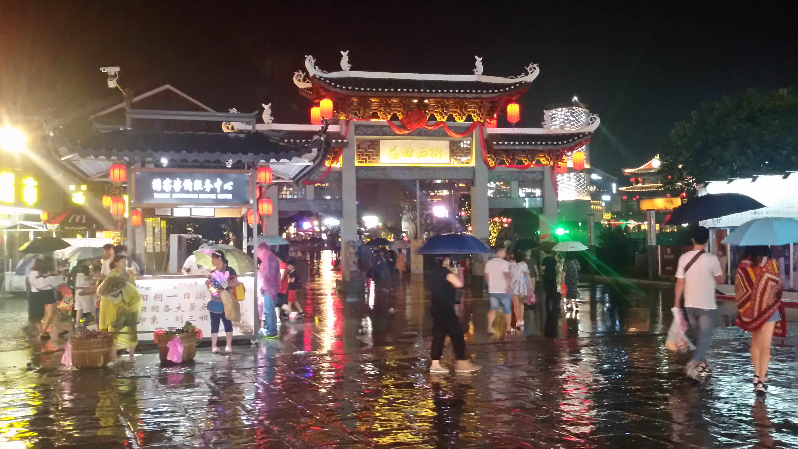 粵語: 桂林陽朔西街